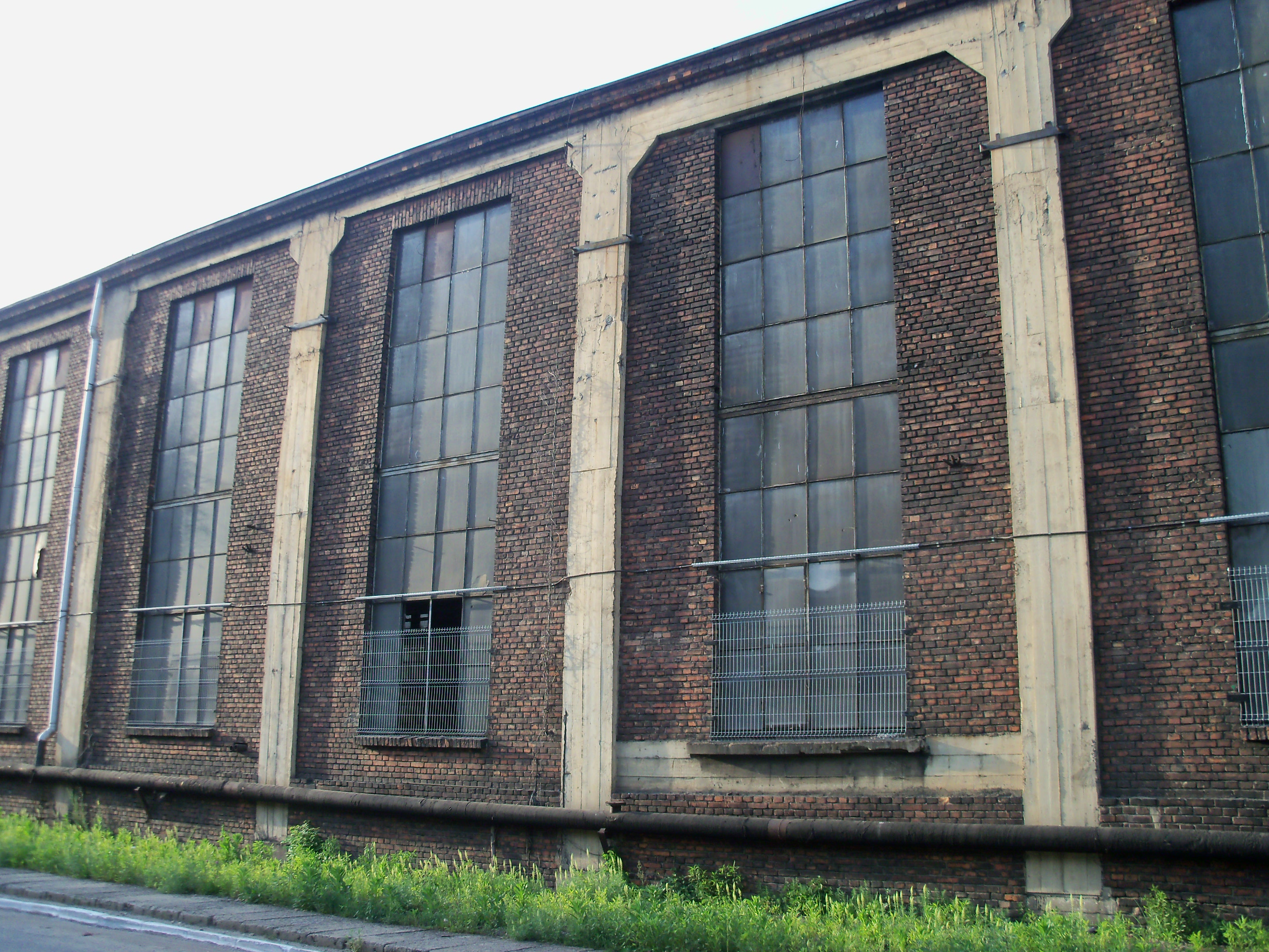 Huta Baildon w Katowicach